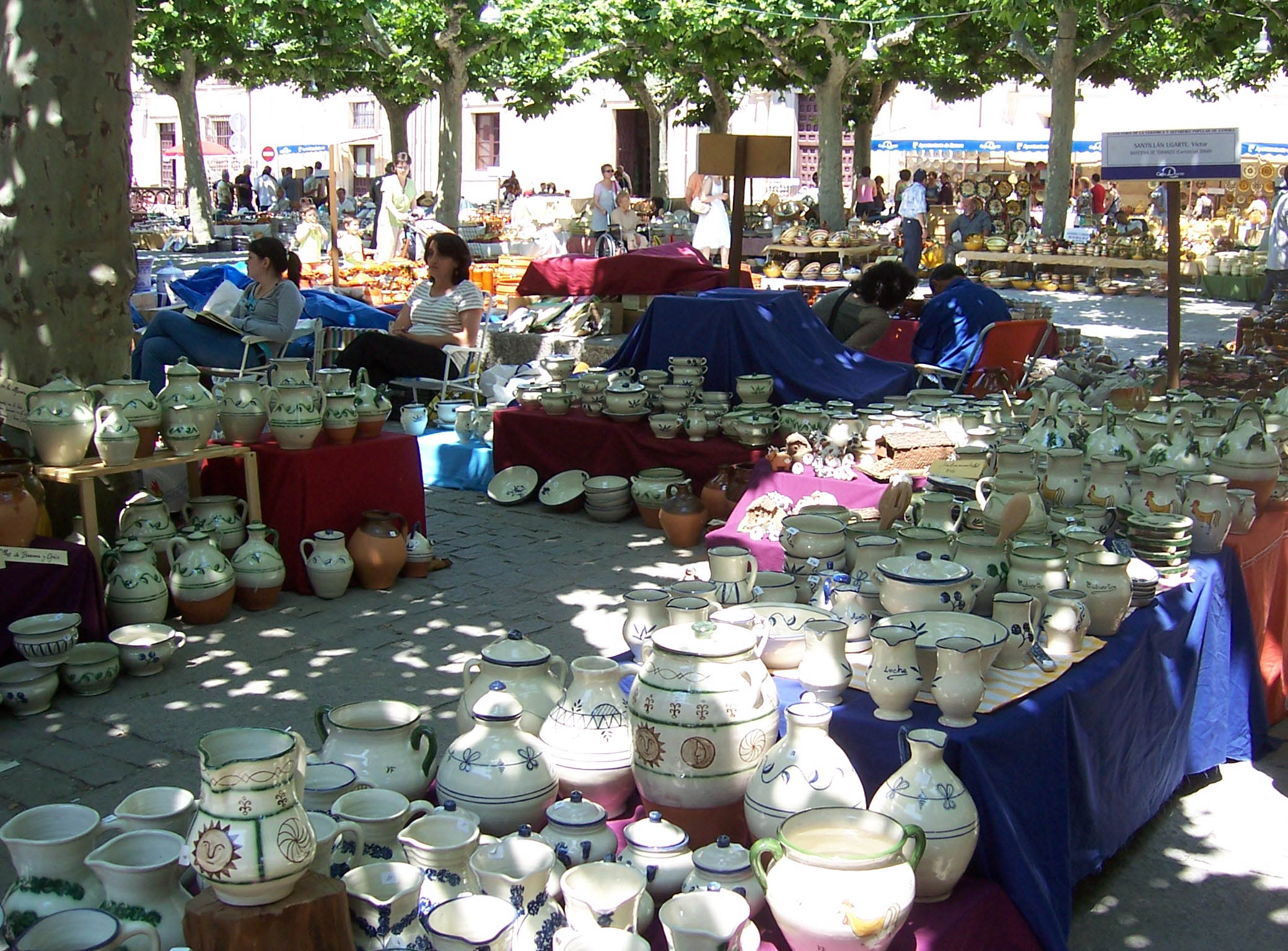 Feria de la Cerámica en la plaza de Viriato de Zamora (España). Año 2008.